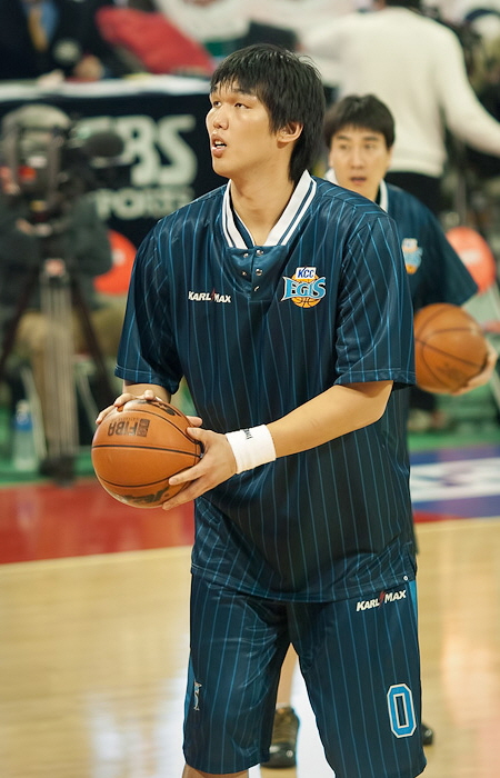 2010-프로농구-KCC-vs-SK